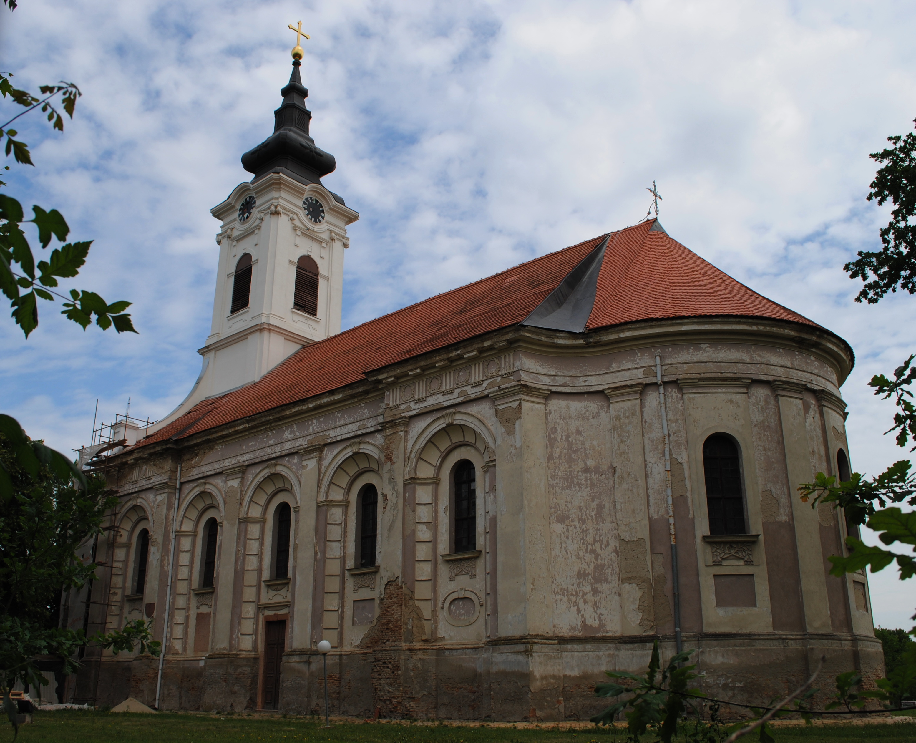 Srpski (latinica): Srpska pravoslavna crkva Svetog oca Nikolaja u Bašaidu SK1613